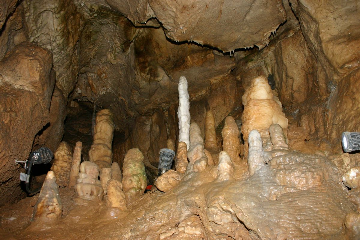 Binghöhle bei Streitberg